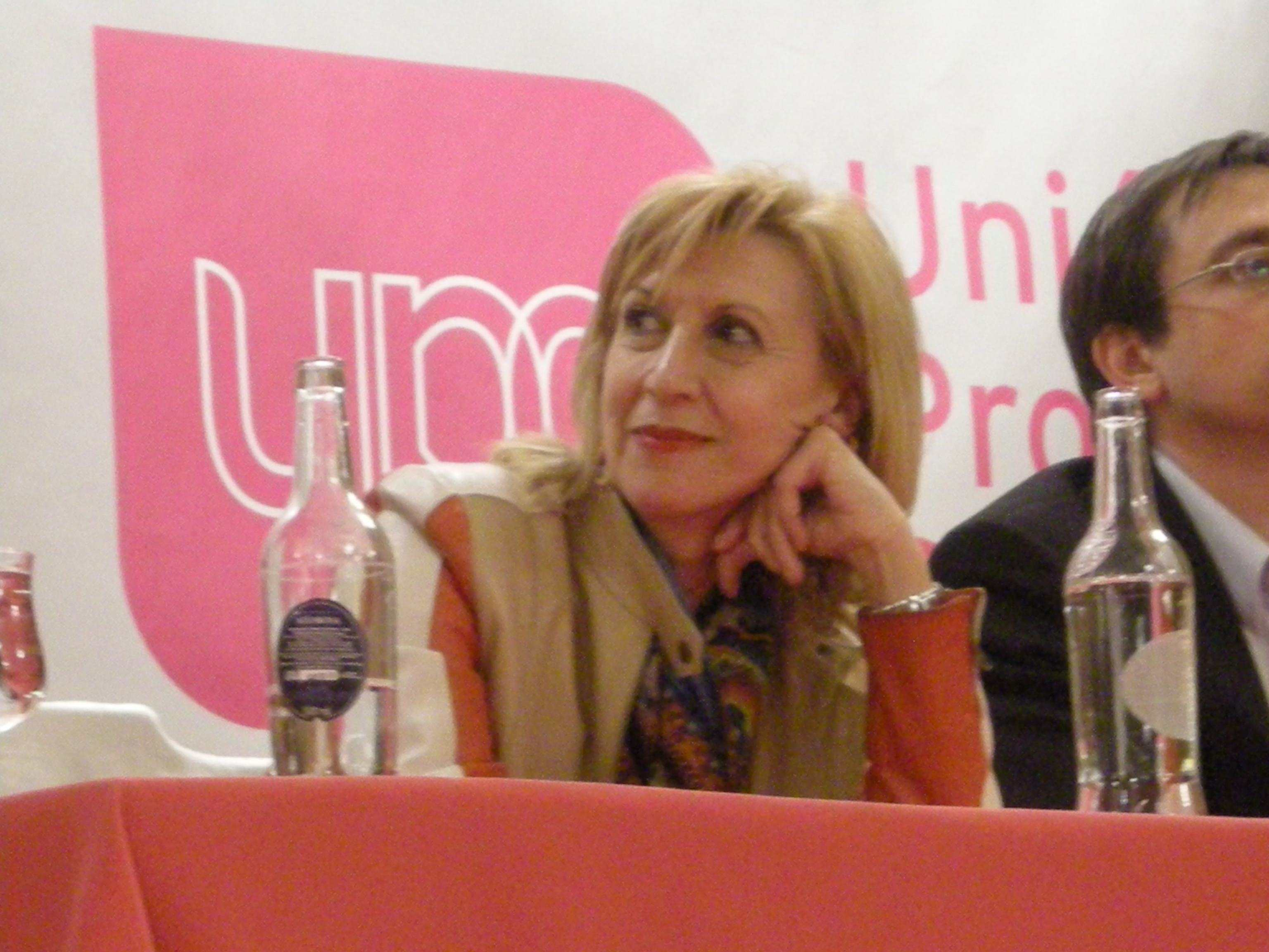 Rosa Diez en un acto en Mostoles